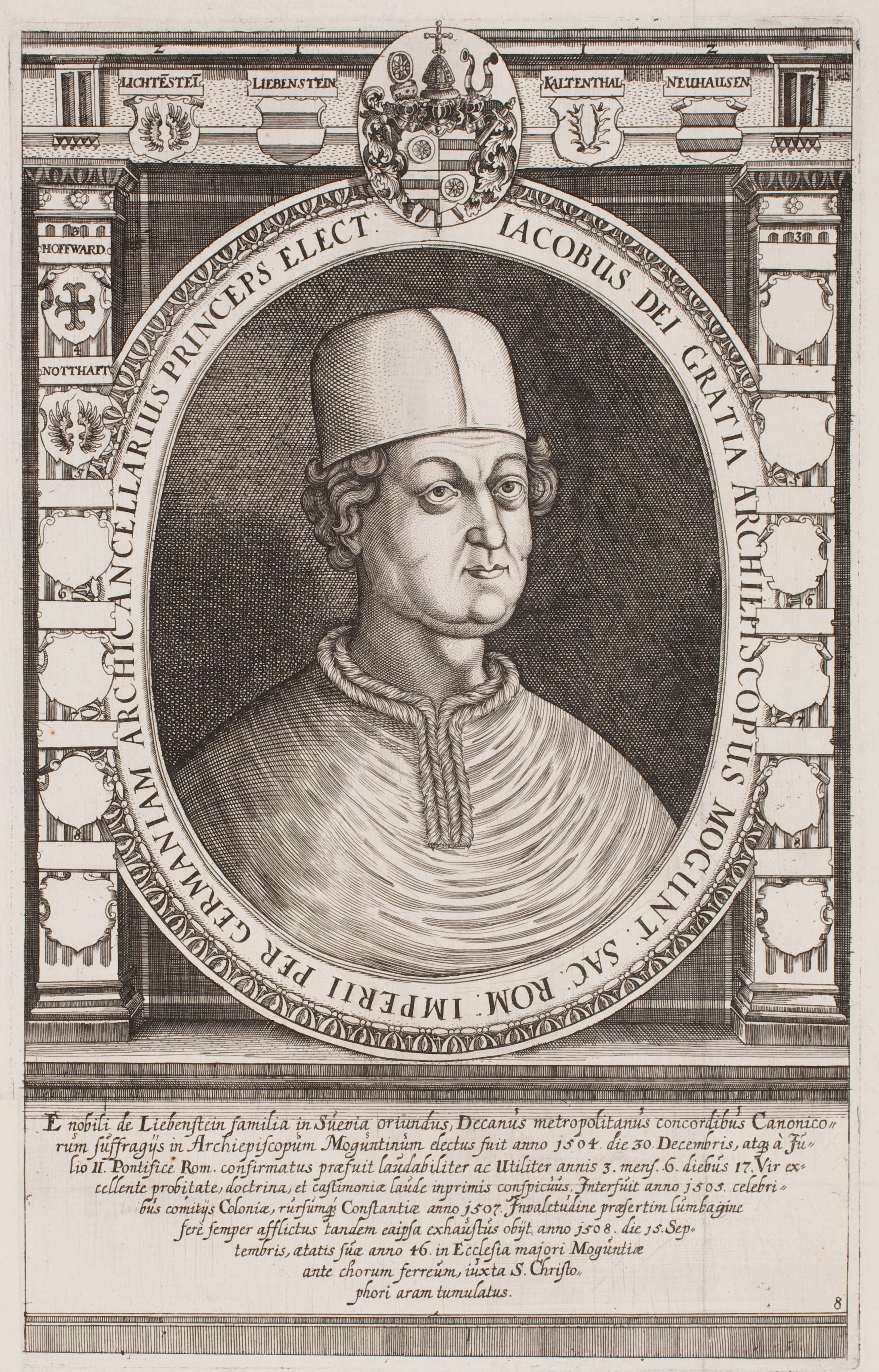 Bildnis Jacob von Liebenstein, 1504-08 Kurfürst und Erzbischof von Mainz